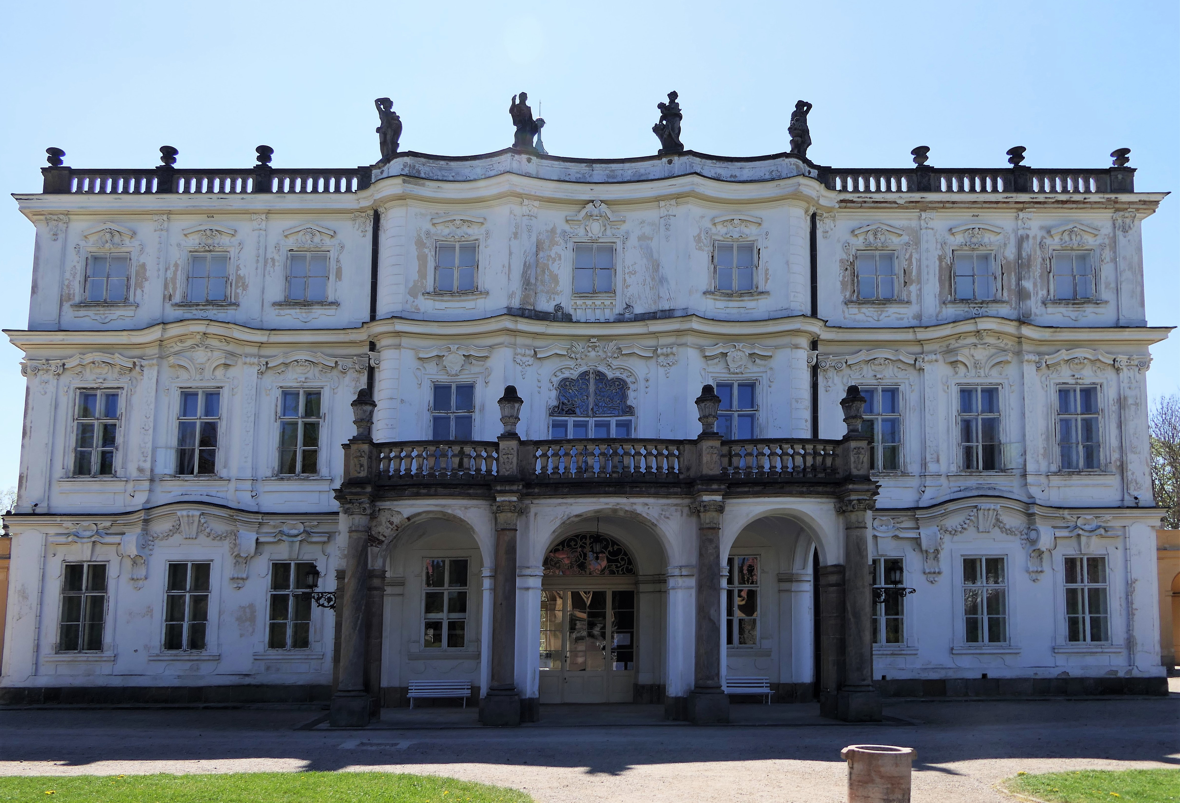 Schloss Ploskovice - Vorderansicht